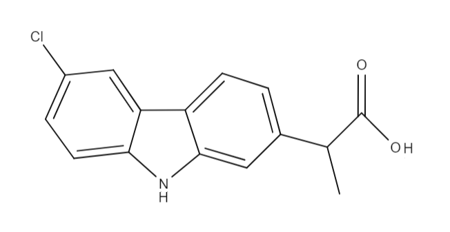 Karprofeeni struktuurivalem